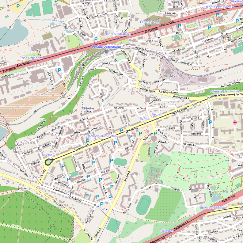 Pražské sídliště Petřiny